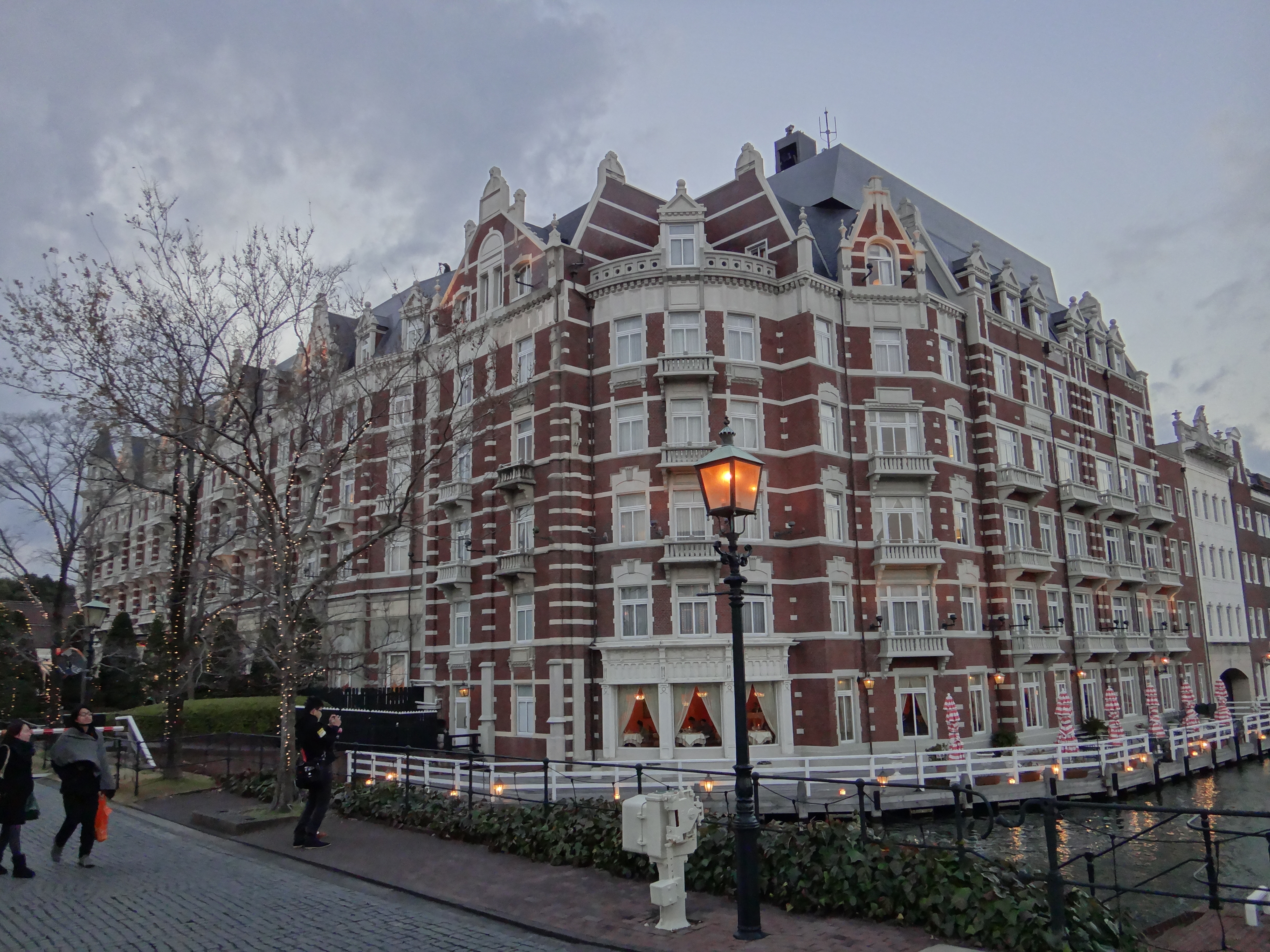 hotel